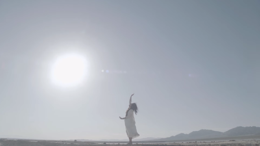 צילום מסך מהוידאו skyscraper